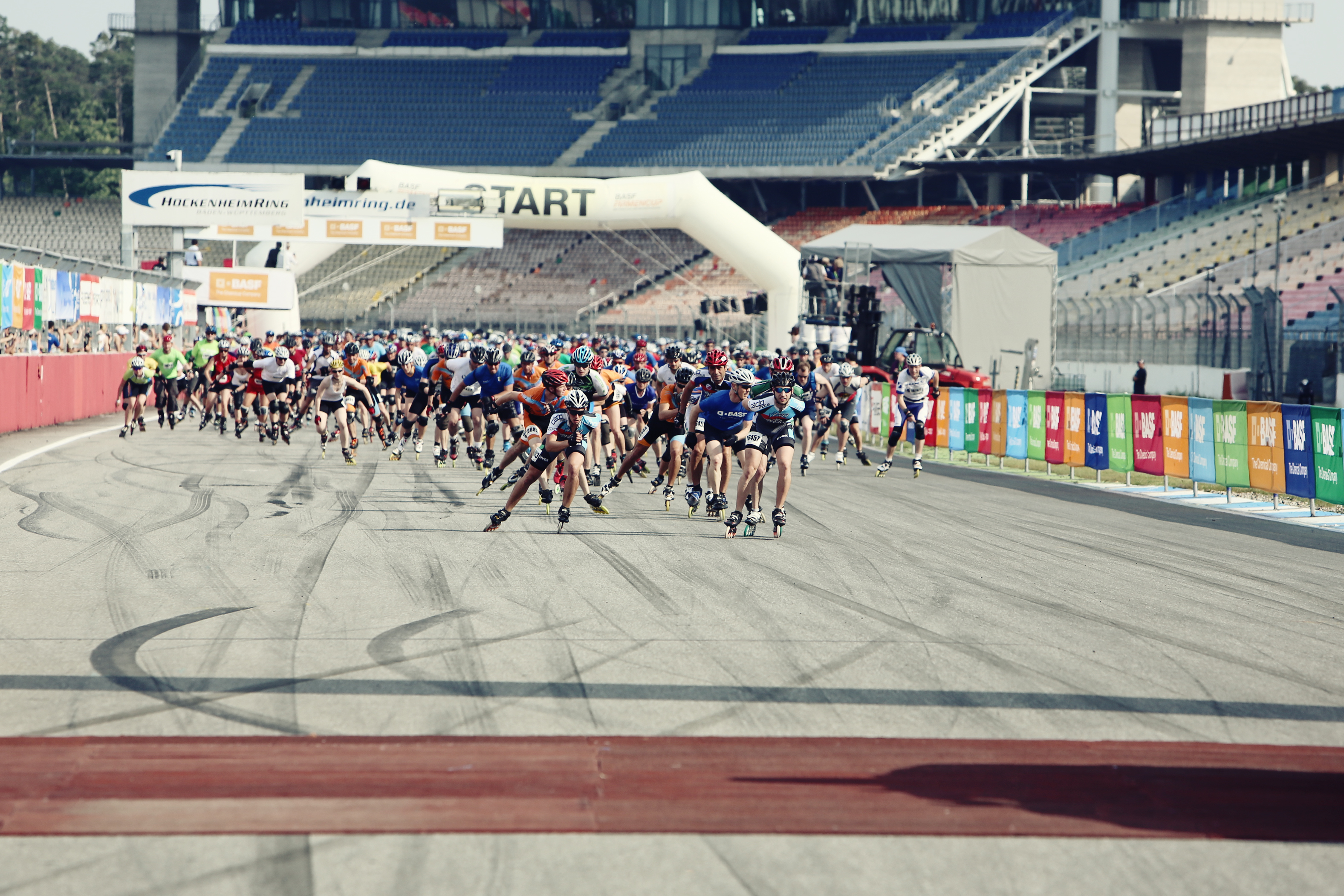 Firmencup-Inliner auf dem Hockenheimring 2013